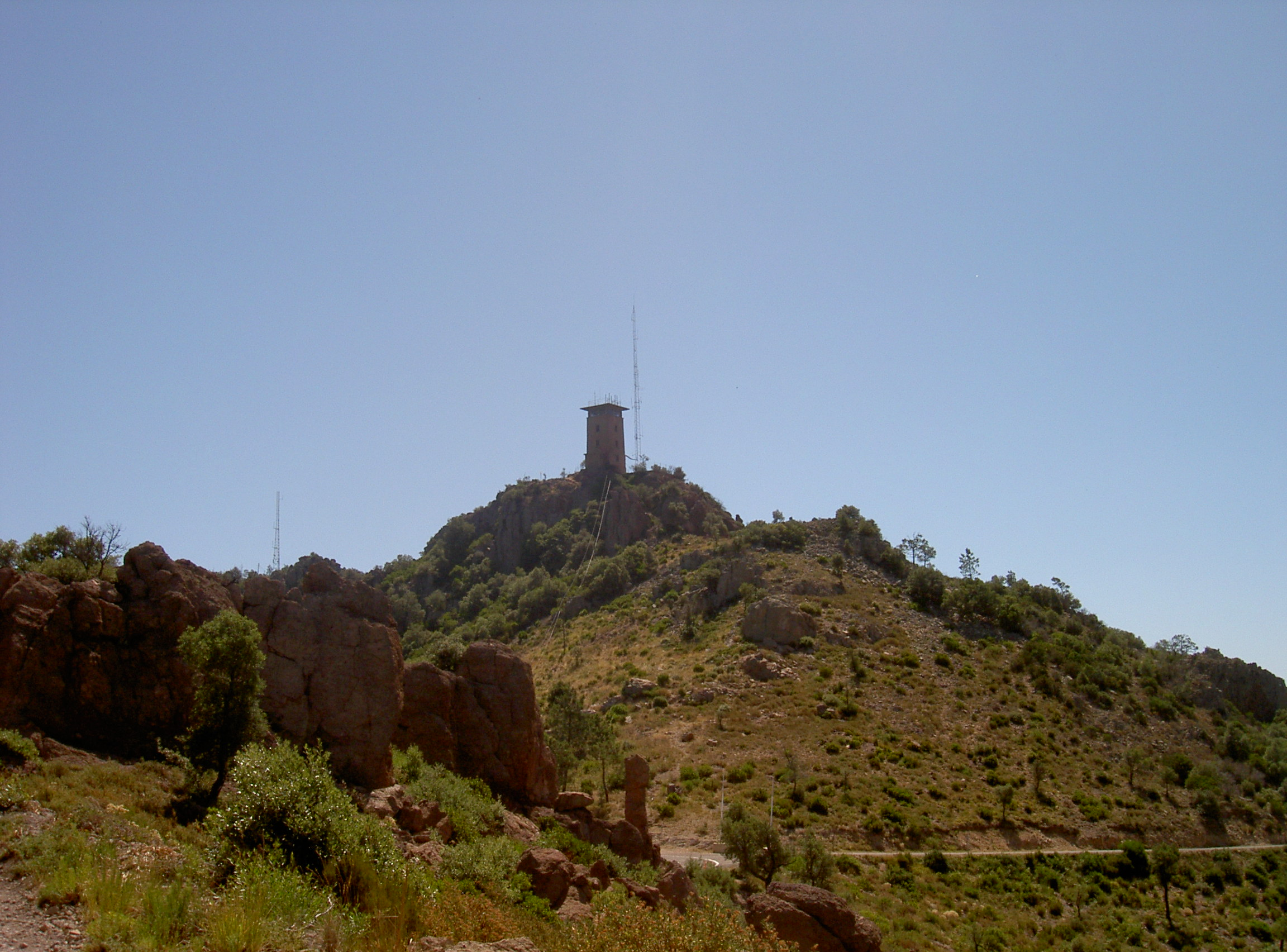 Tour du Mont Vinaigre (Esterel)